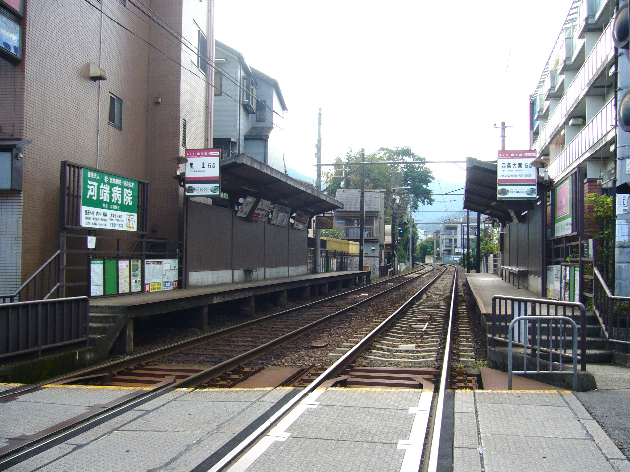 京福電気鉄道嵐山本線鹿王院駅。2007年9月10日に投稿者が撮影。